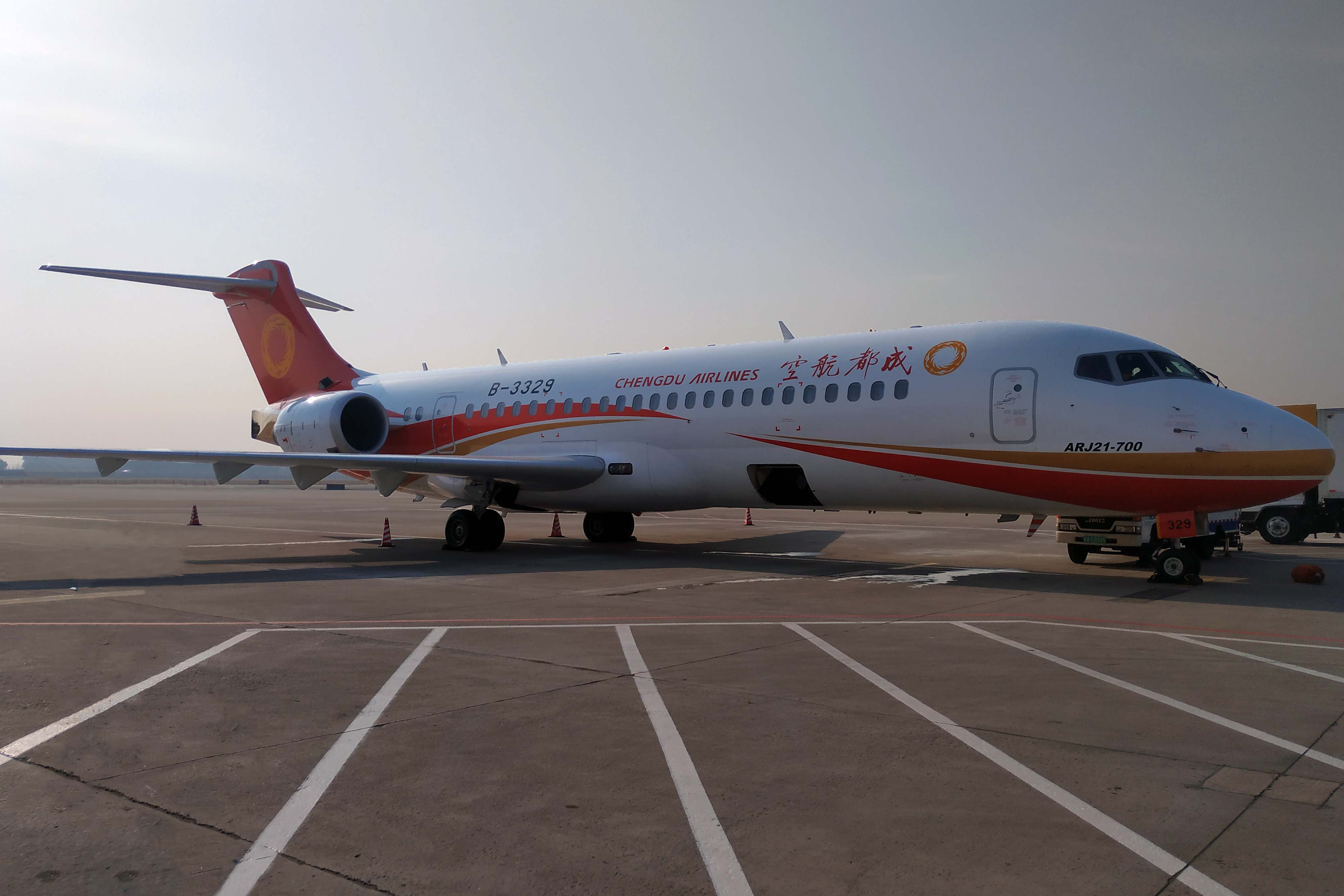 中文（中国大陆）: 注册号为B-3329的成都航空ARJ21-700飞机在哈尔滨太平国际机场